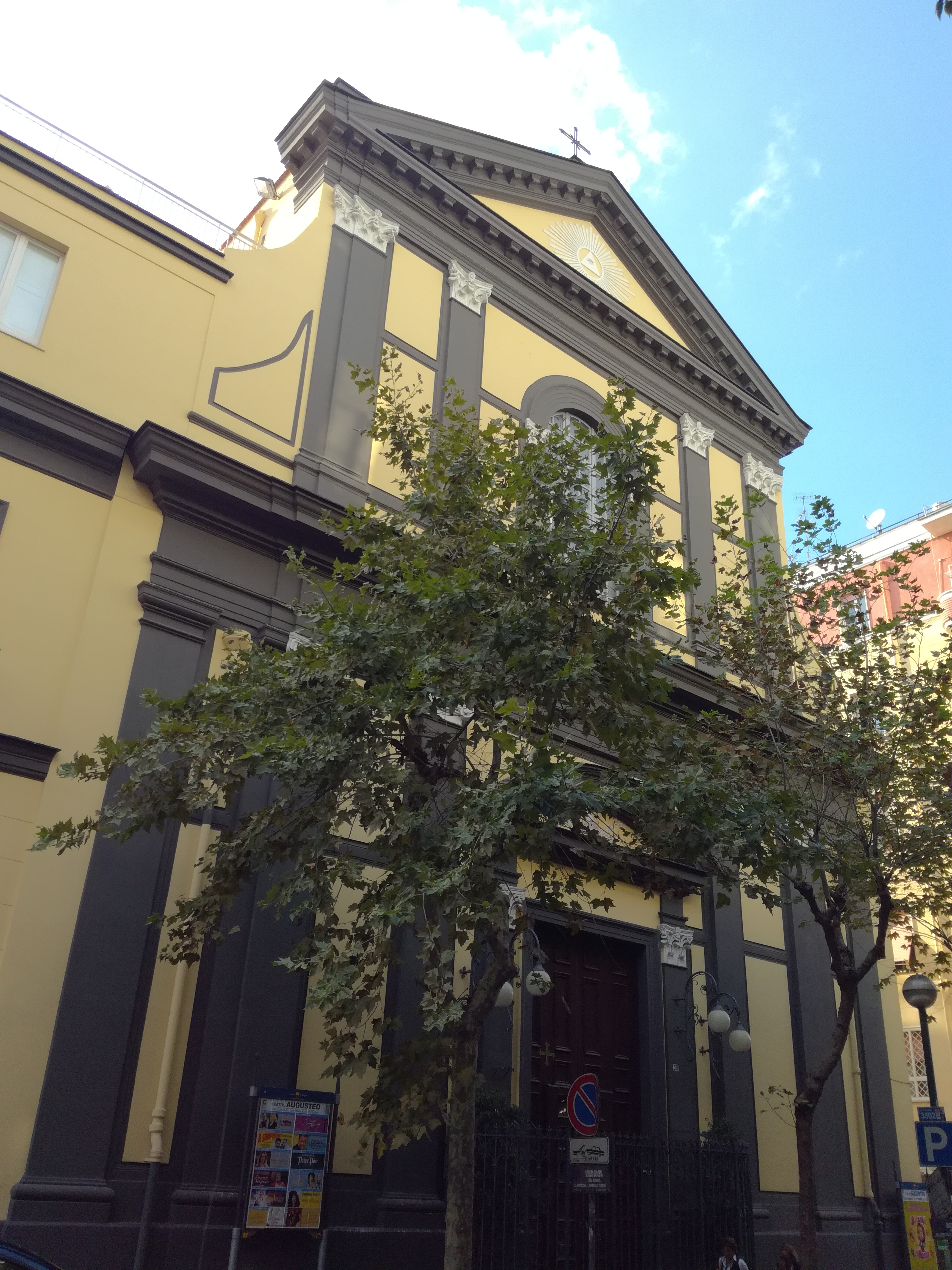 Facciata della chiesa di San Gennaro al Vomero (Napoli)